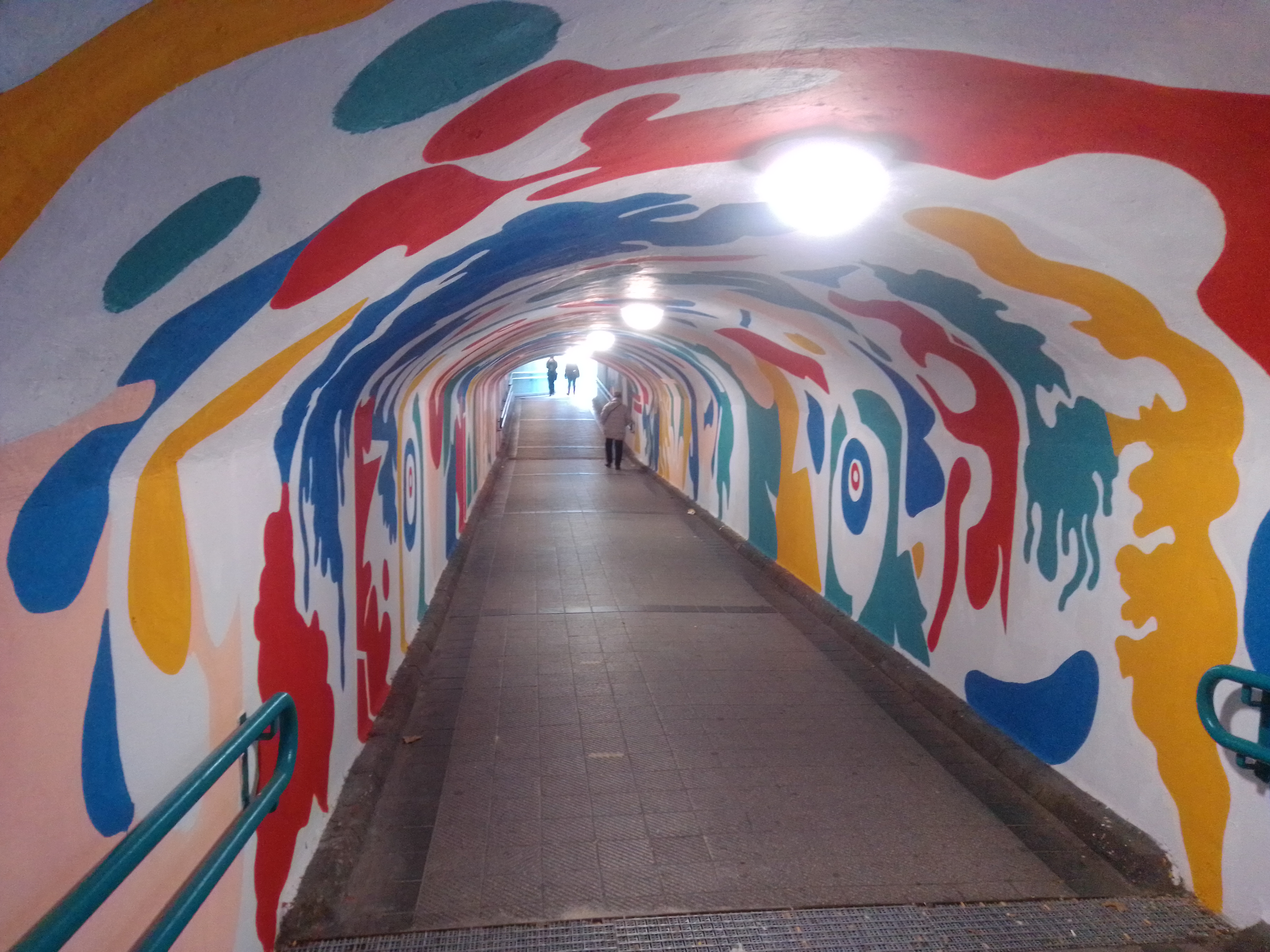 Intervención artística en el túnel de Las Delicias - Valladolid (España)